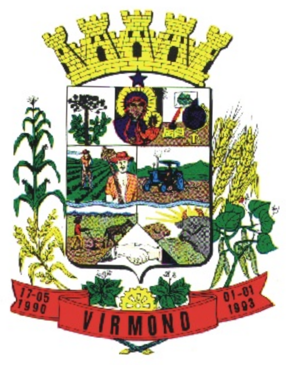 Brasão do Município de Virmond, Paraná, Brasil.